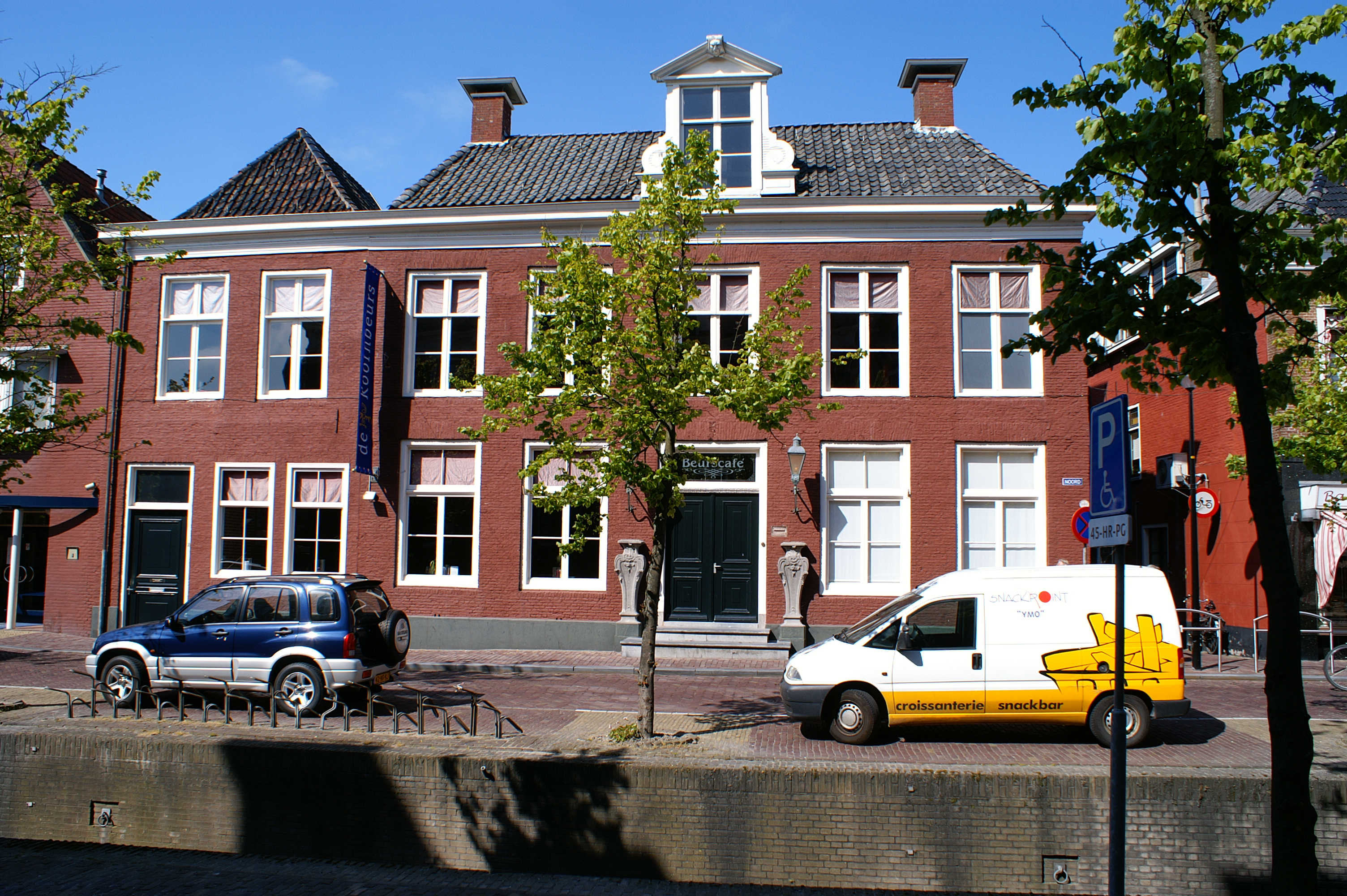 Stins Groot Botnia te Franeker.